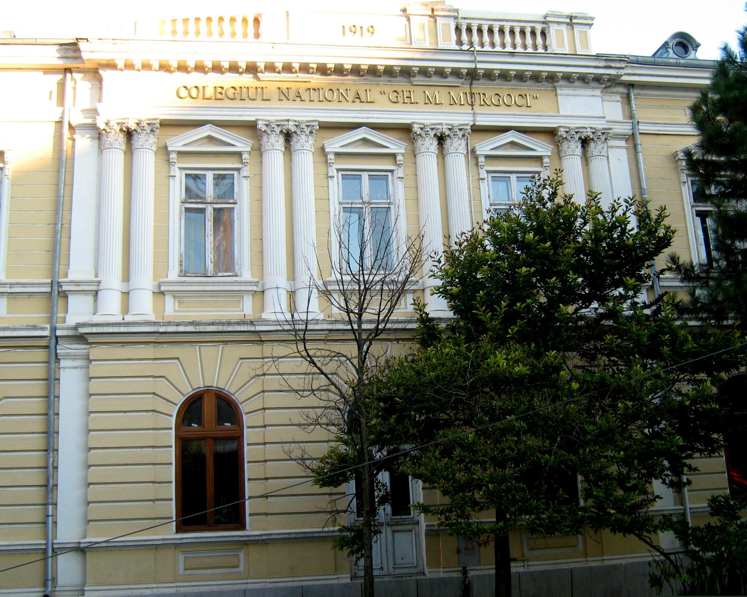 Fostul Liceu de fete, azi Colegiul Național " Gh. Munteanu Murgoci"